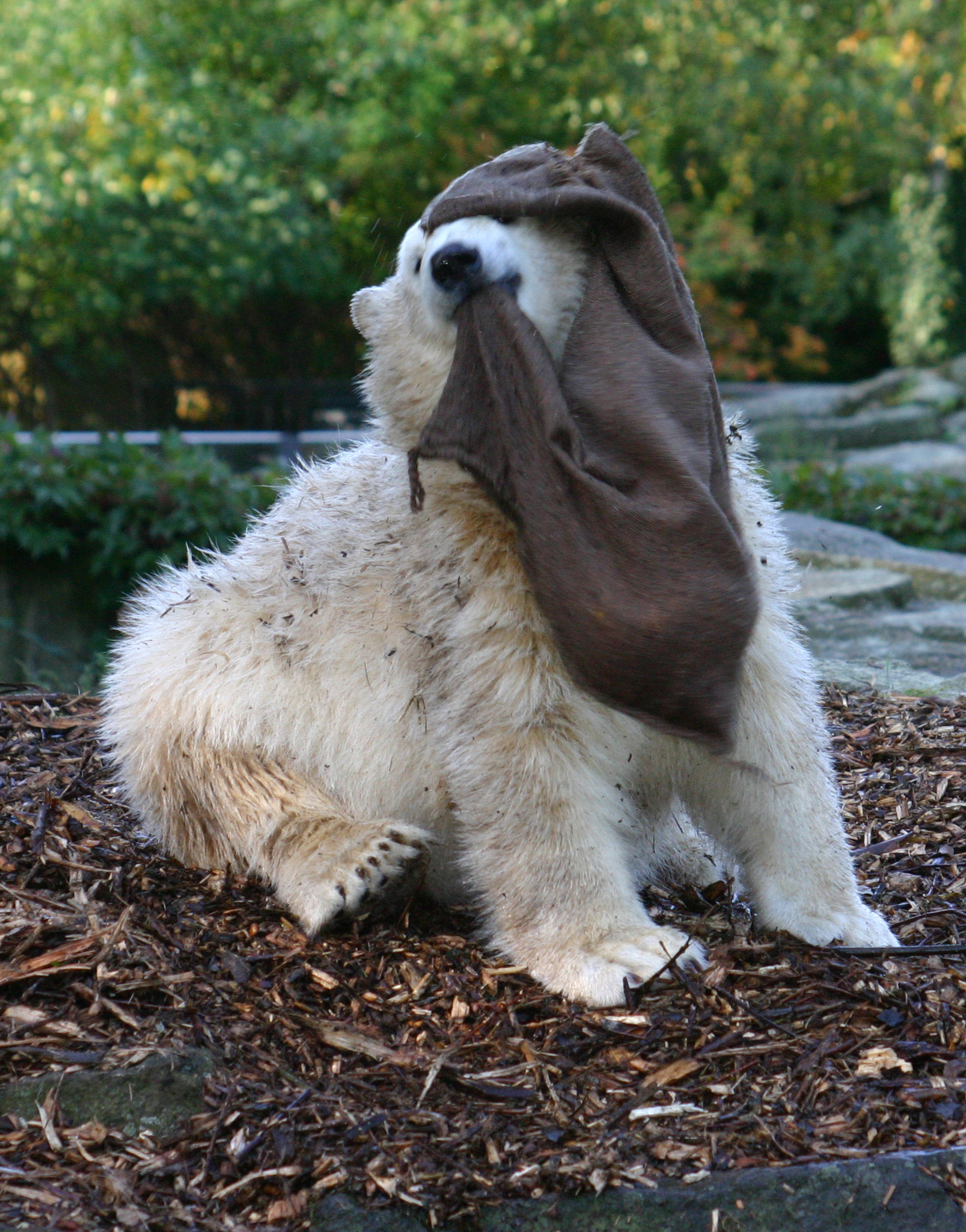 Eisbär Knut im Zoo Berlin